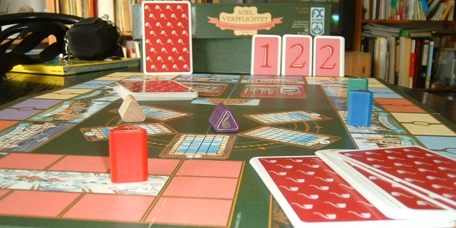 Adel verpflichtet, Brettspiel